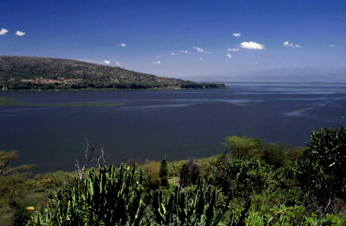 Lake Naivasha